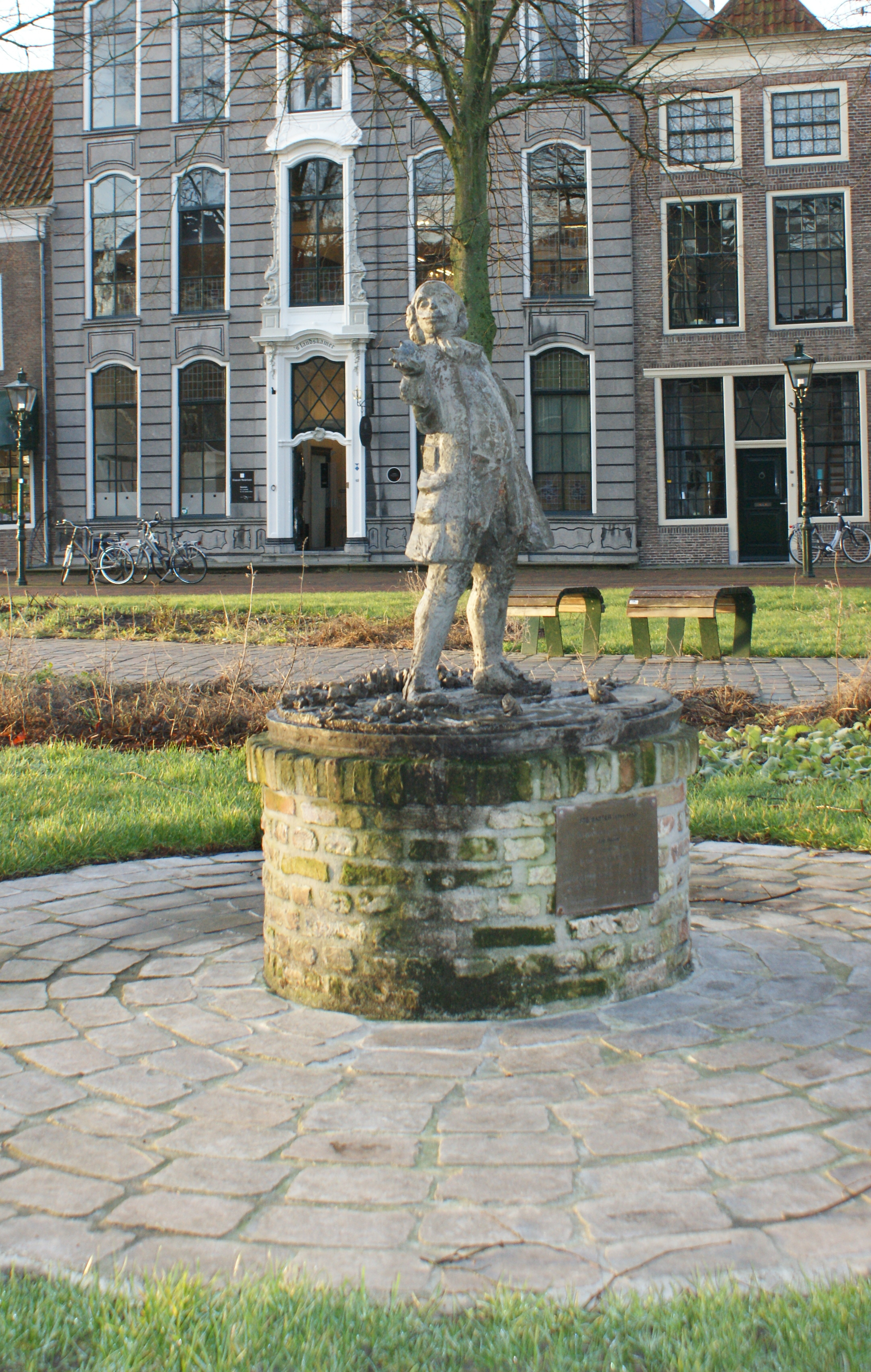 Foto Job Baster Zierikzee Havenpark